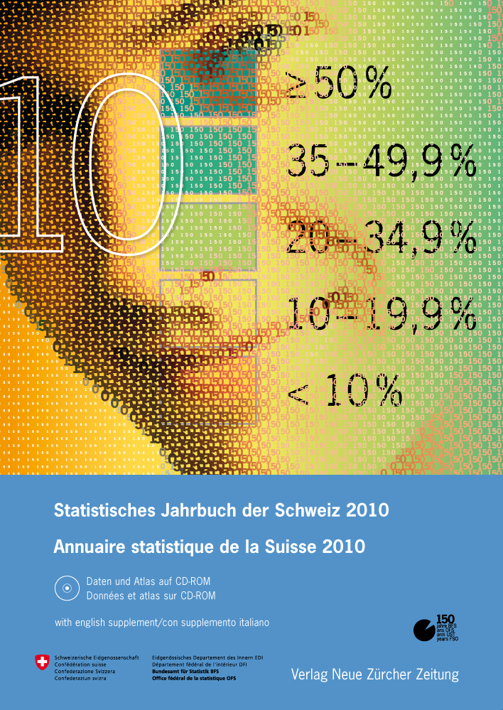 Titelbild Publikation Statistisches Jahrbuch 2010